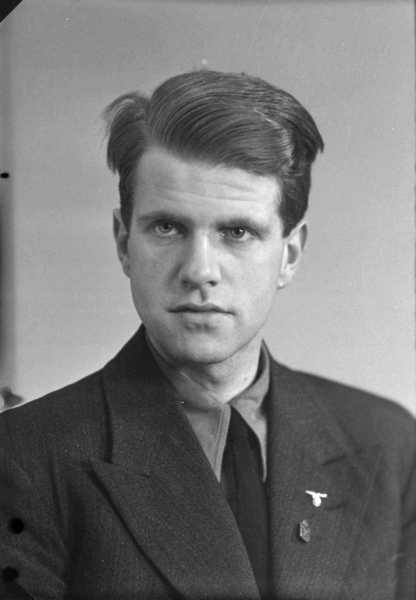 Henrik Rogstad